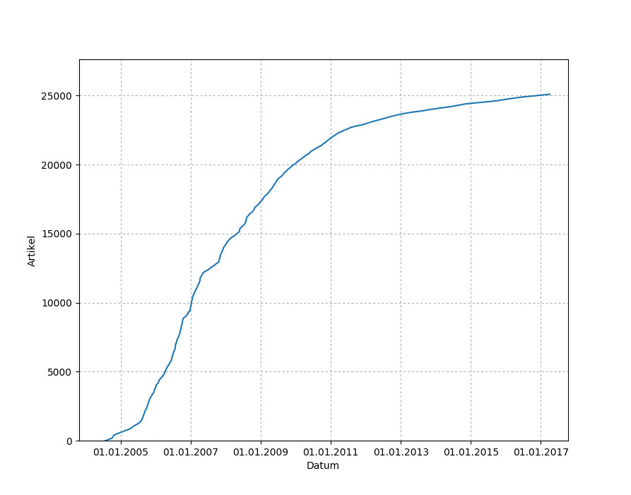 Erstellt mithilfe eines eigens geschriebenem Skripts: Quelle der Daten